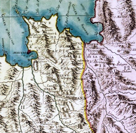 La pieve de Cinarca - Extrait de la carte militaire de Corse en 1768 - Sont marquées toutes les paroisses et tous les principaux hameaux de chaque pieve / rectifiée en l'année 1740, suivant les ordres de Monsieur le marquis de Maillebois